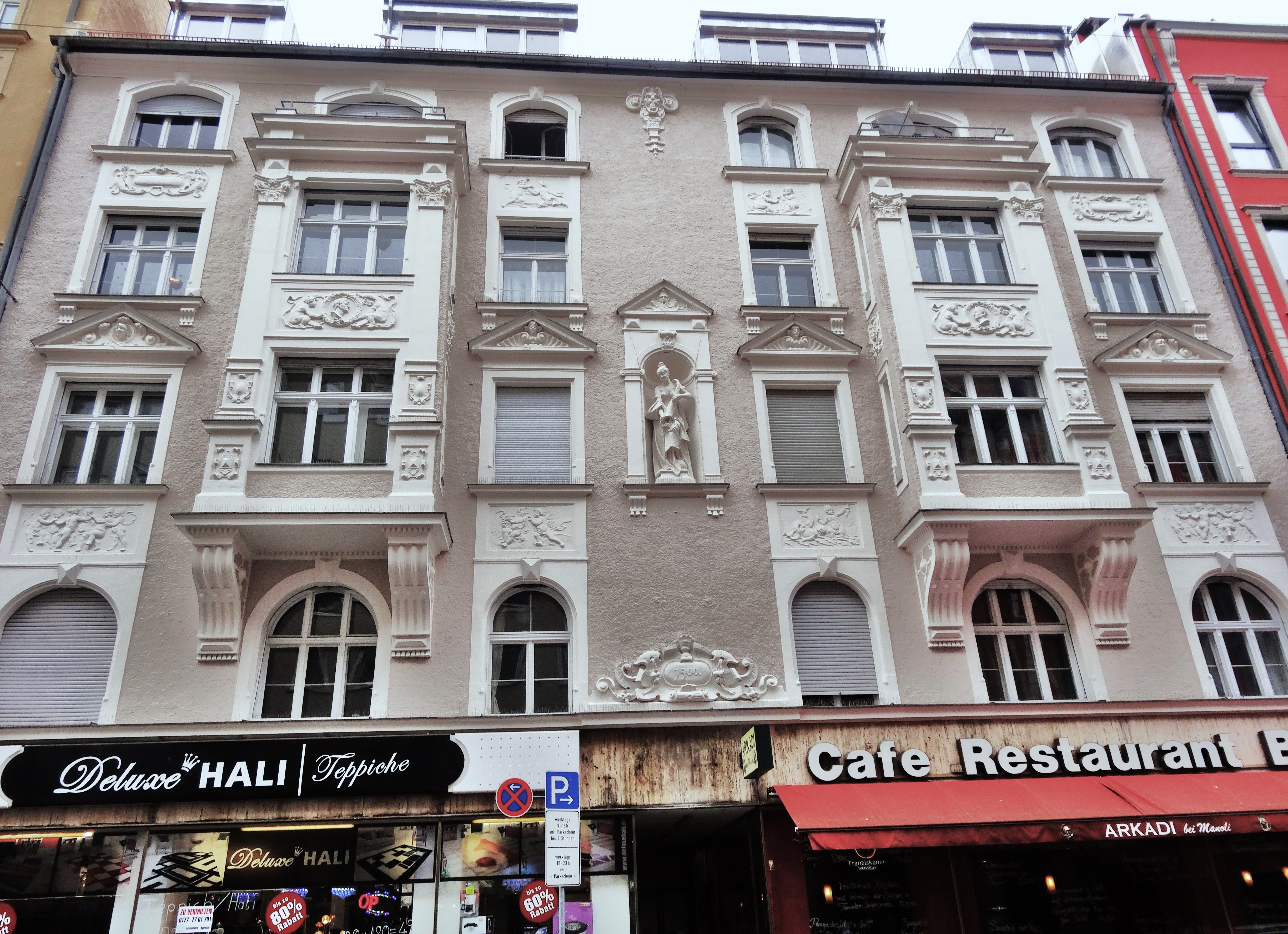 München, Landwehrstraße 58, Mietshaus erbaut 1901,Architekten J. und M. Könyves